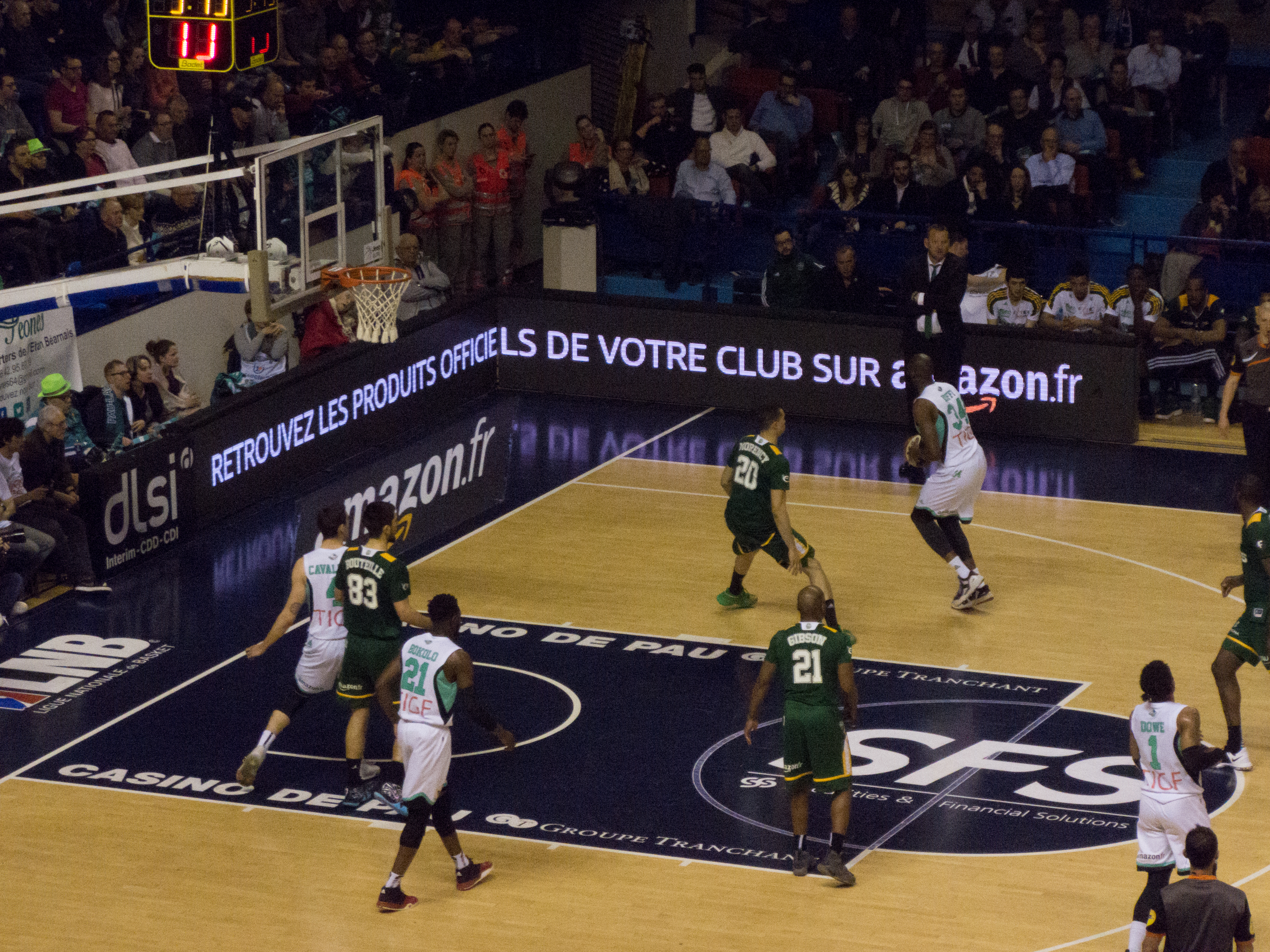 2017–18 Pro A season — 20 March 2018, palais des sports de Pau. Match between: Élan Béarnais Pau-Lacq-Orthez — Limoges CSP